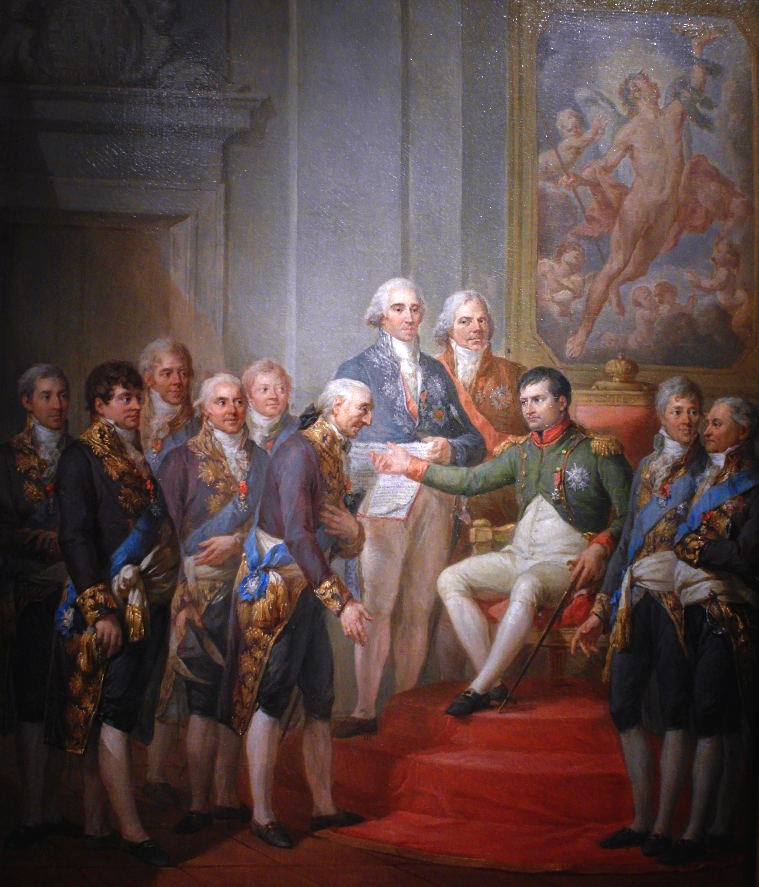 Portrait of Napoleon, Talleyrand, Hugues-Bernard Maret duc de Bassano, Stanisław Małachowski, Ludwik Szymon Gutakowski, Stanisław Kostka Potocki, Józef Wybicki, Ksawery Działyński, Paweł Bieliński, Władysław Sobolewski, Juliusz Łuszczewski.